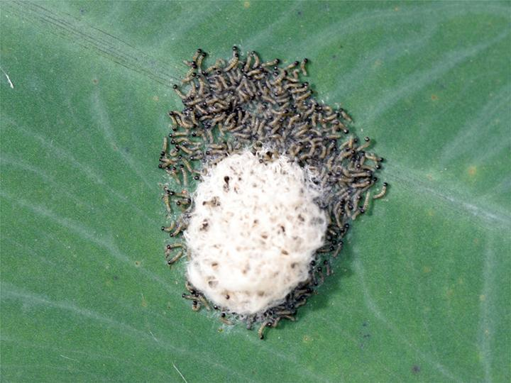 Spodoptera litura, emerging larvae - Spodoptera litura damage to Colocasia esculenta (taro), Munaweni Village, Naitasiri, Fiji Islands. 7th Sept 2005.